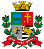 Brasão de Monteiro Lobato